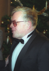 Andrei Petrov, Russian composer